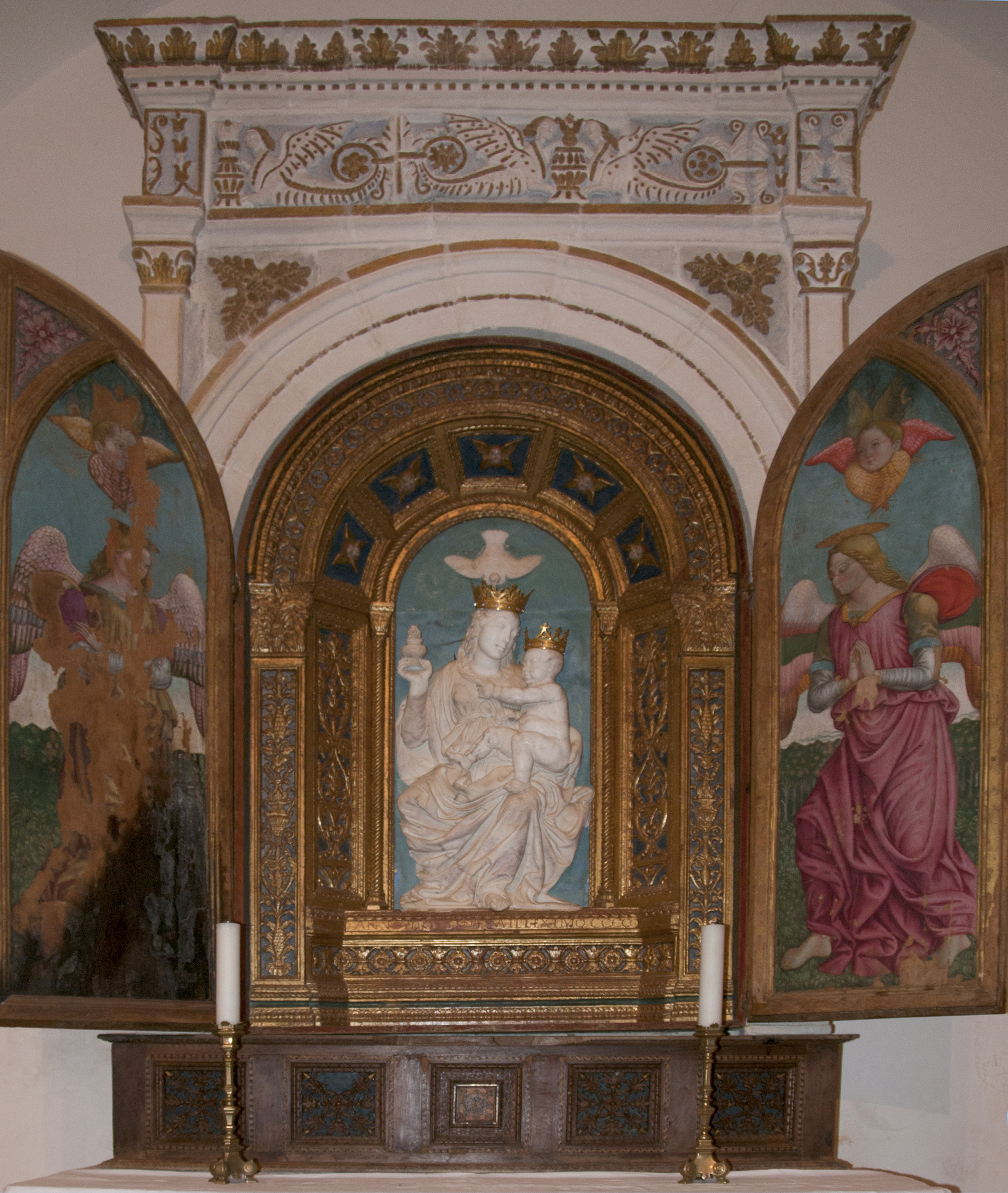 Chiesa della Madonna Bianca - Ancarano